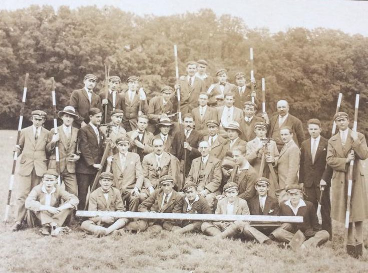 Tibor Schön und Kommilitonen der königlich ungarischen Joseph-Universität für Technik und Wirtschaftswissenschaften in Budapest posieren mit Fluchtstäben und anderen geodätischen Geräten auf Feldexkursion zwecks Vermessungsübungen außerhalb Budapests, 1928